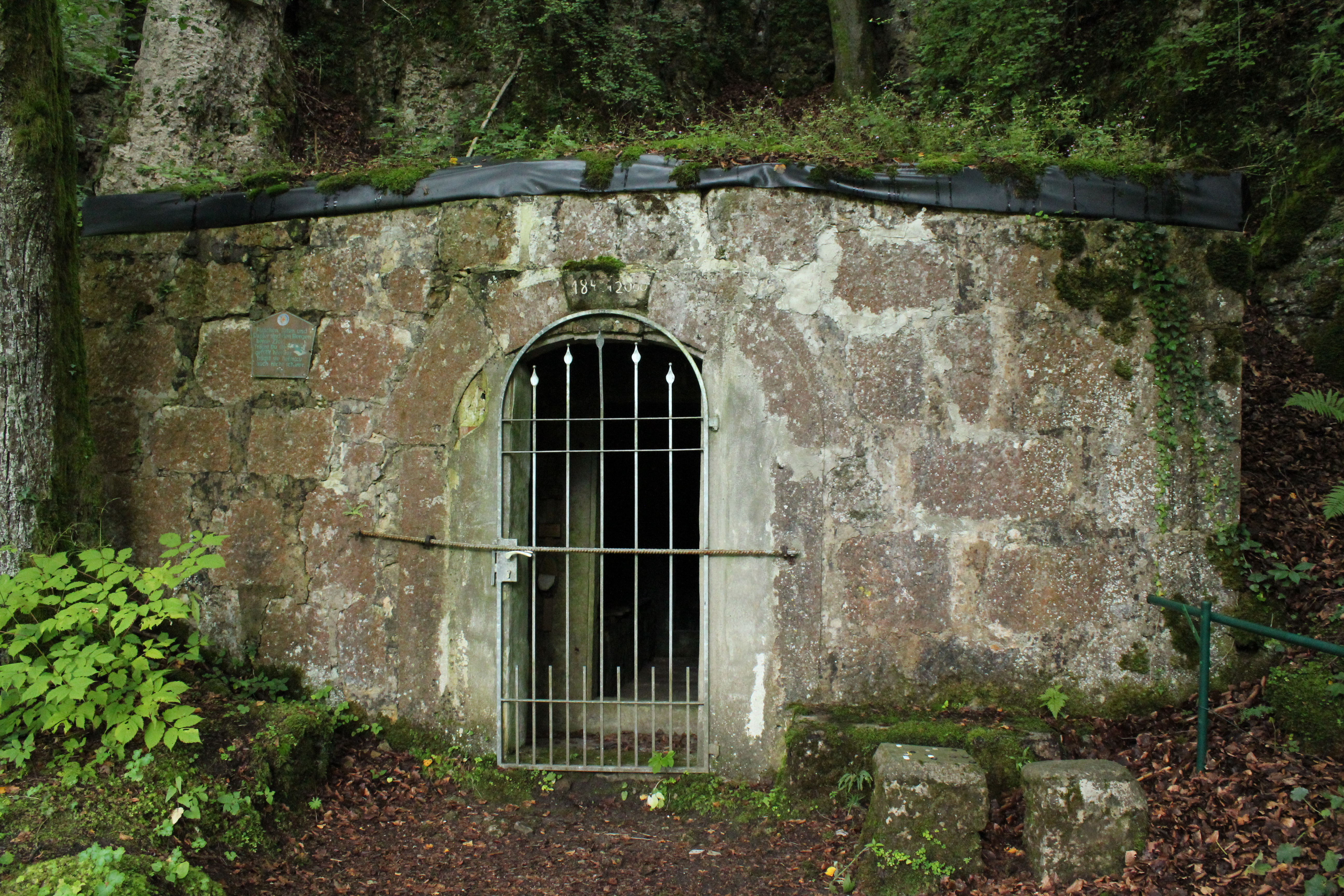 Felsenkeller einer ehemaligen Stadelhofener Brauerei im Paradiestal (Tempelskeller C 212)